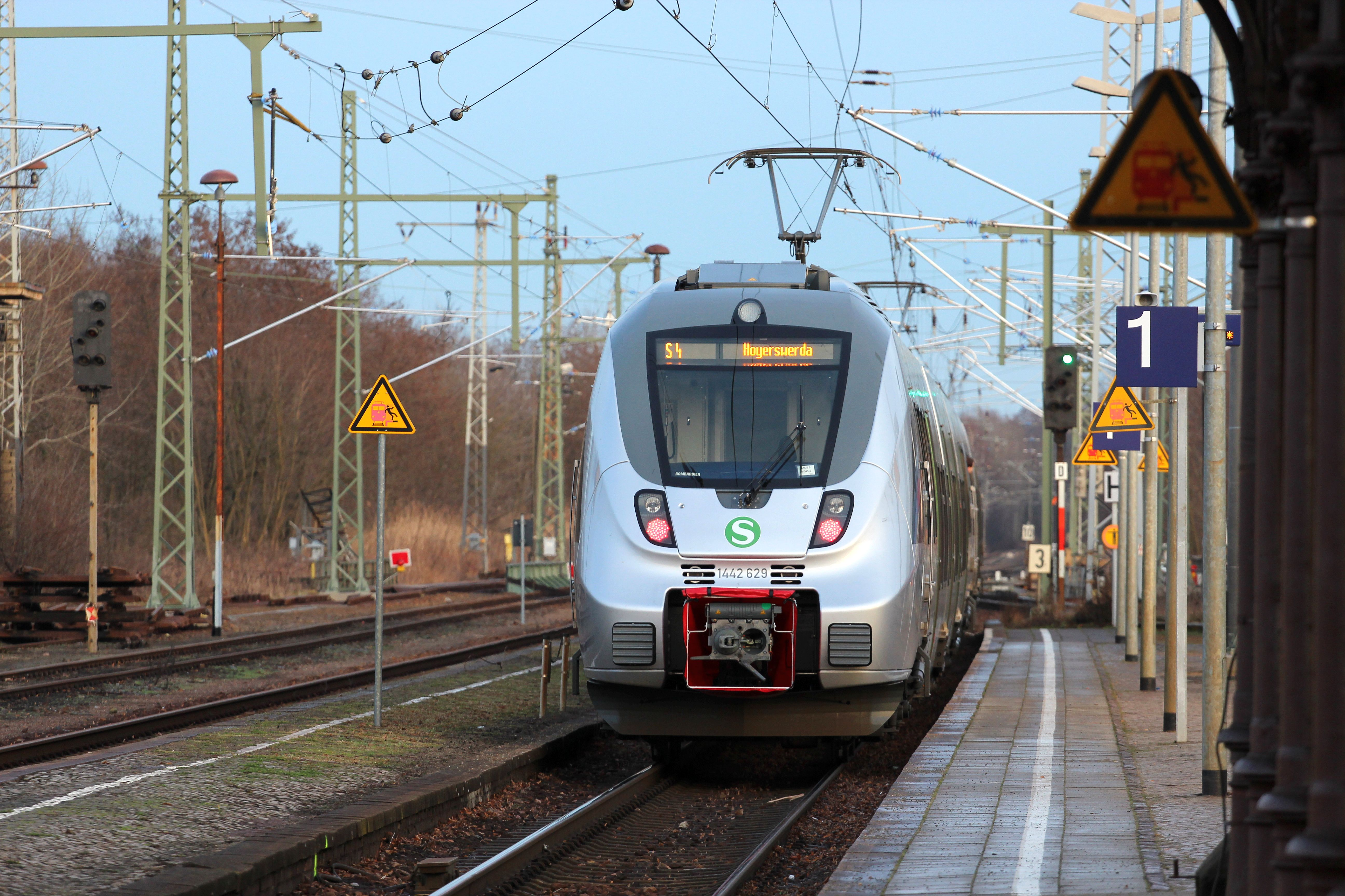 Ein Bombardier Talent 2 der S-Bahn Mitteldeutschland beim Halt im Bahnhof Elsterwerda-Biehla.